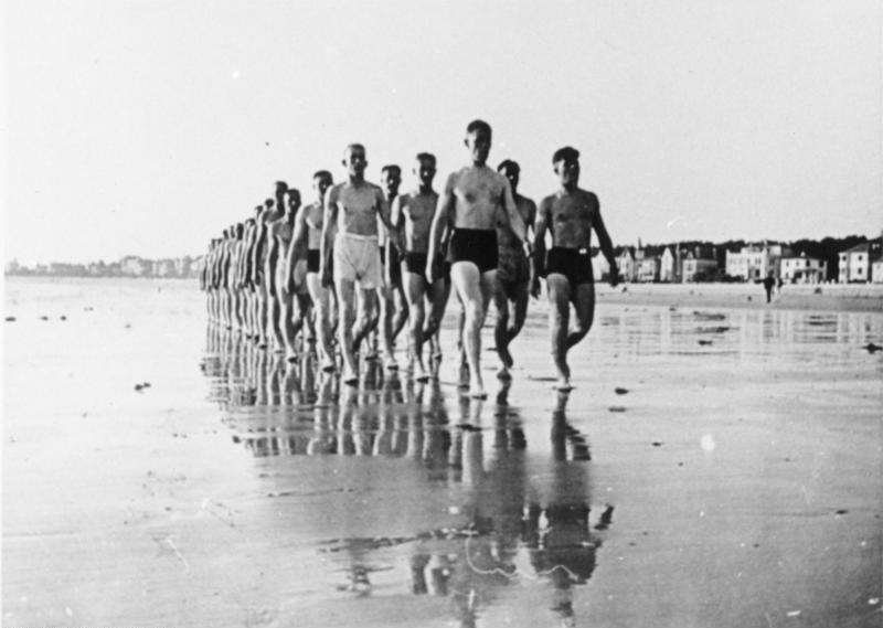 Deutsche Soldaten baden im Atlantik. Royan, Frankreich